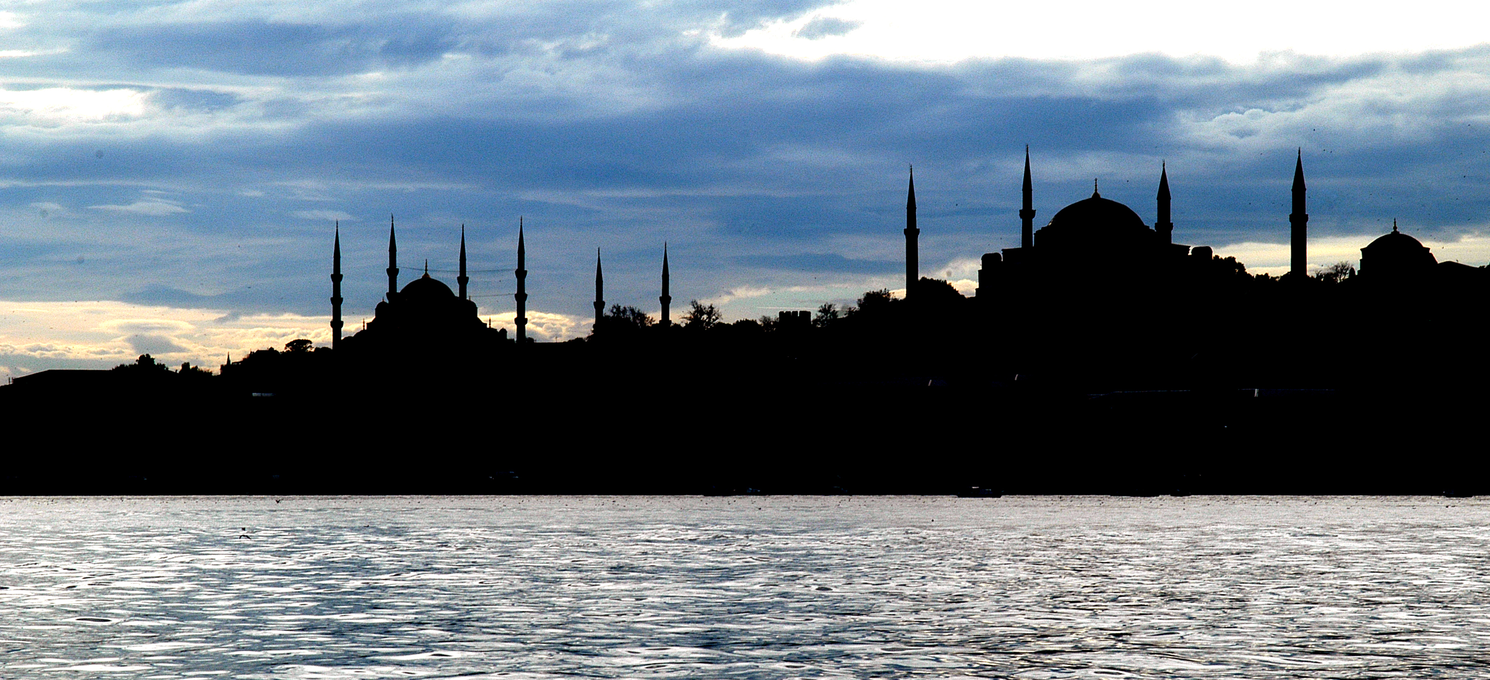 Bir İstanbul silueti Ayasofya ve Sultanahmet Camii